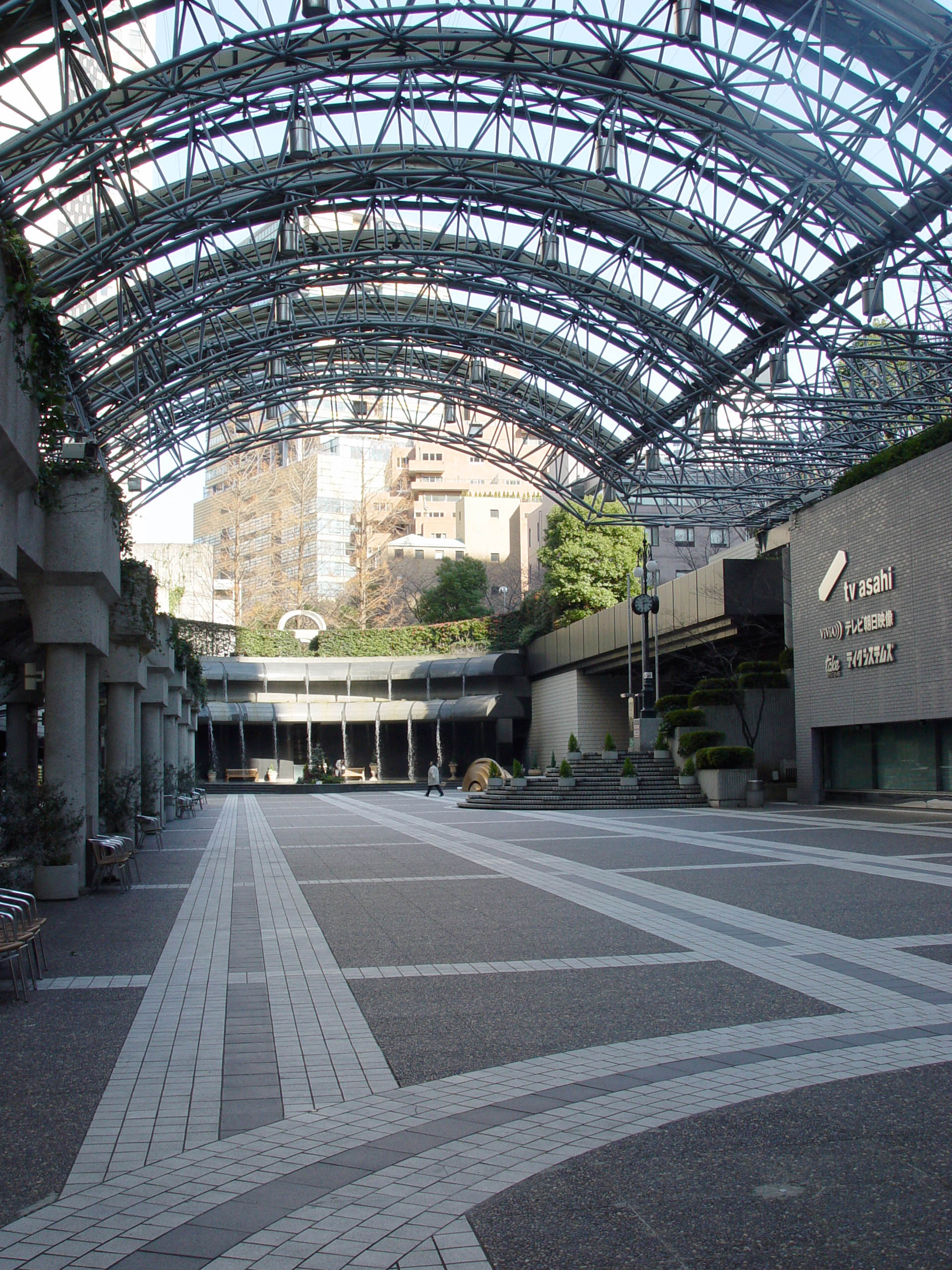 Herbert von Karajan Platz of Ark Hills, Minato, Tokyo, Japan アークヒルズのカラヤン広場